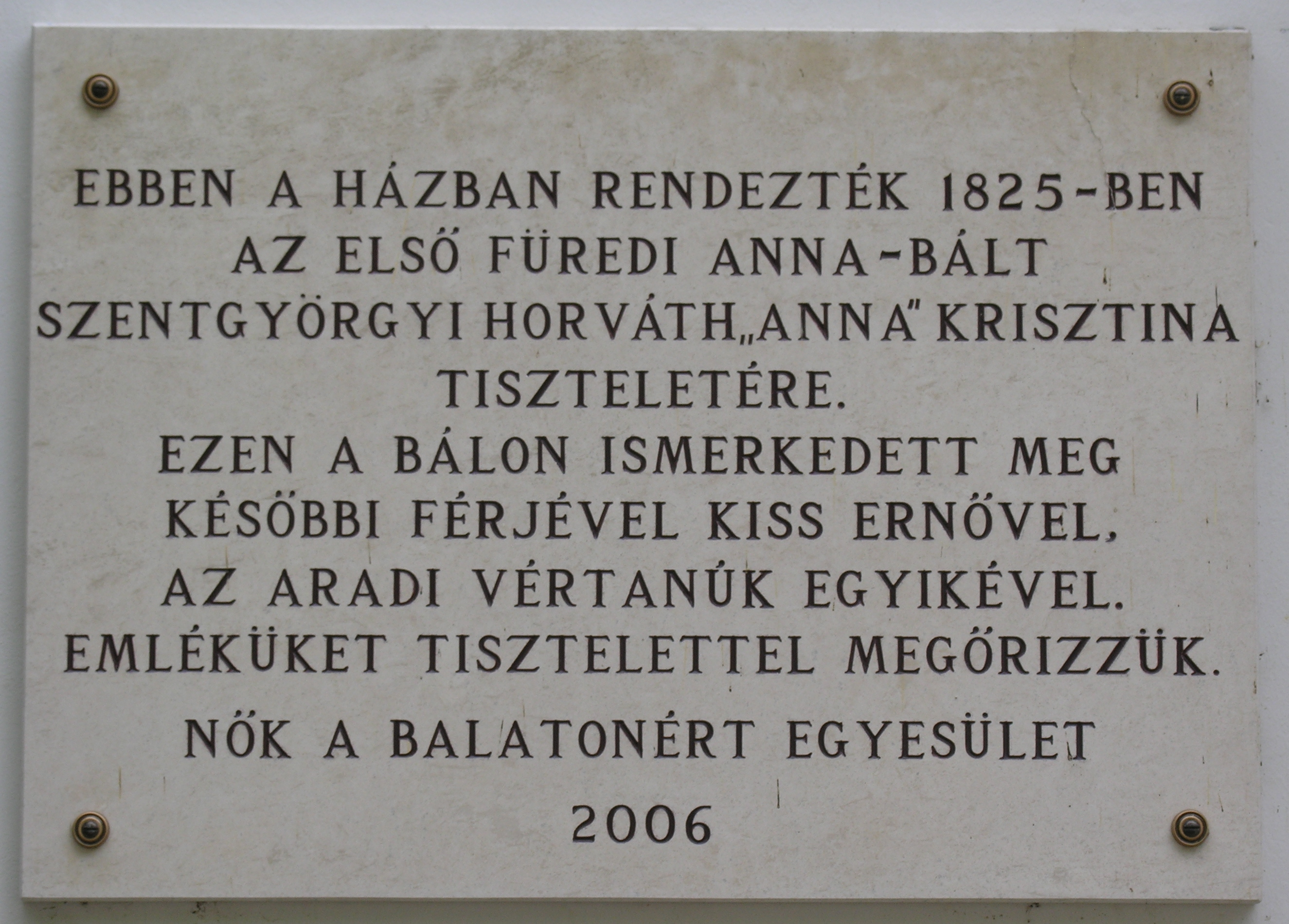 Anna-bál emléktáblája, Balatonfüred, Gyógy tér 3. (Blaha Lujza utcai oldalon)